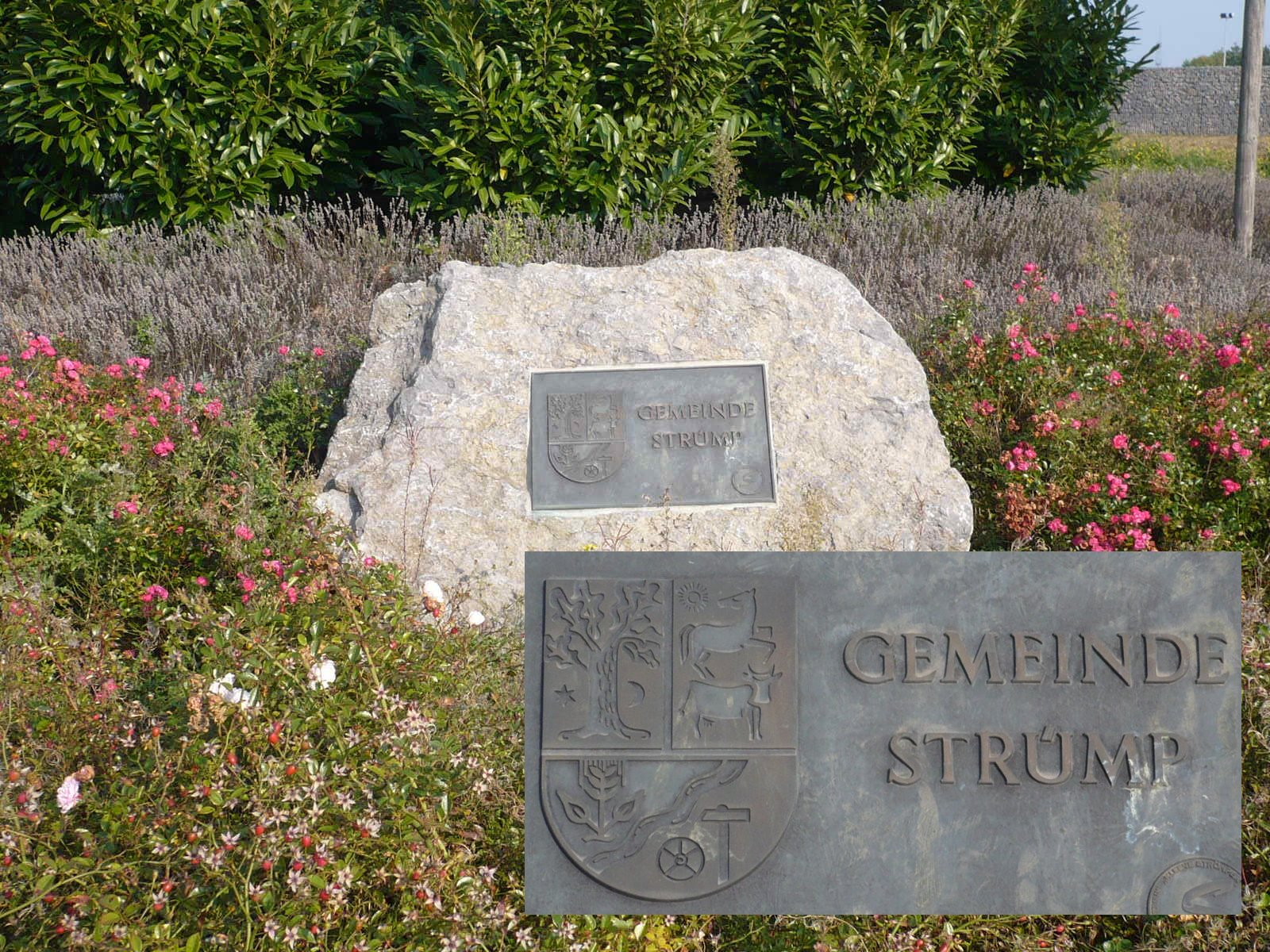 Stein im Kreisverkehr Fritz-Wendt-Str. in Strümp